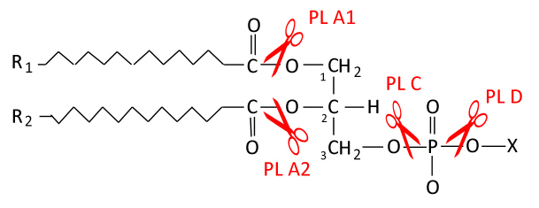 Action des différents groupes de phospholipases sur les phospholipides